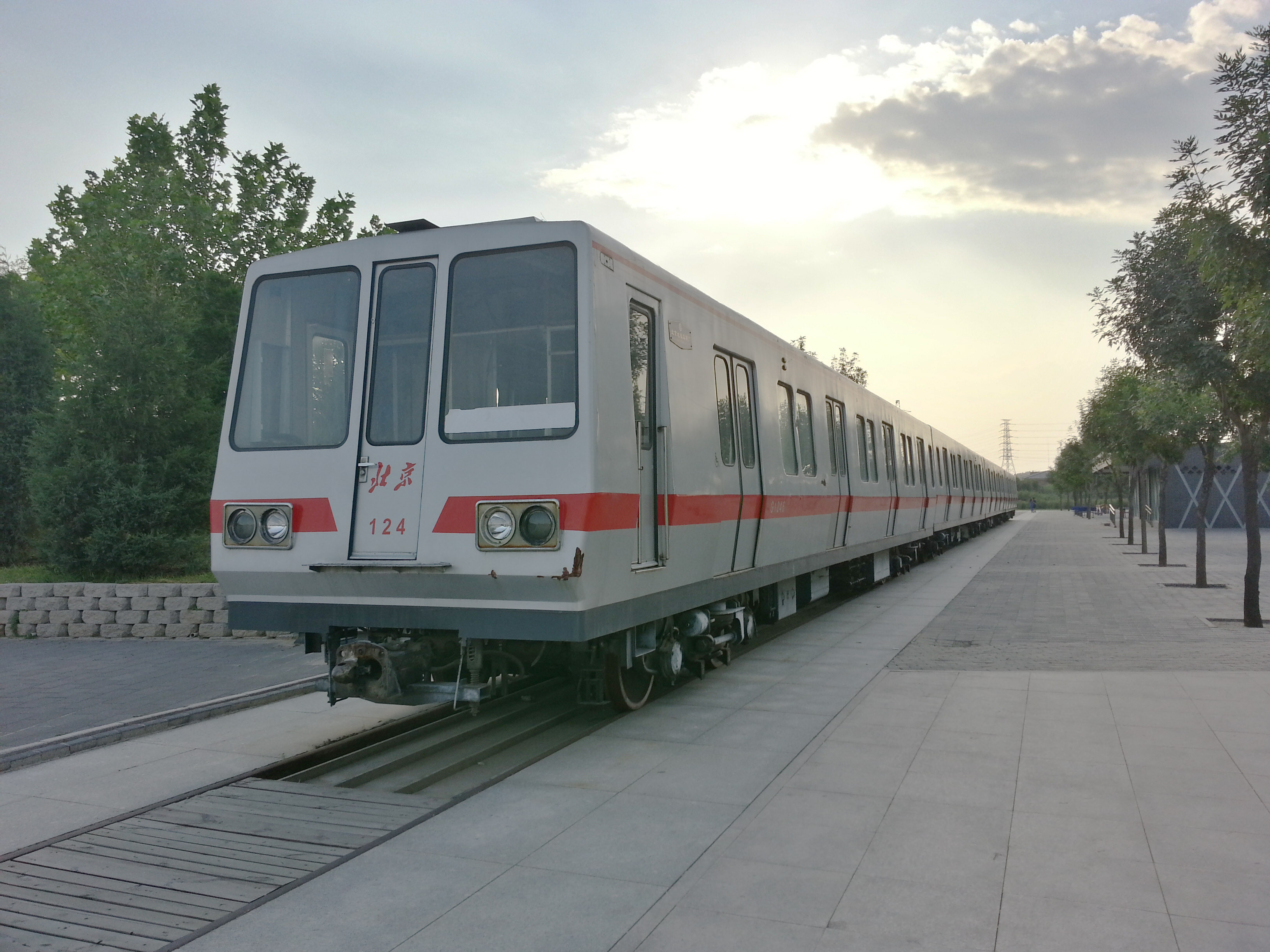 北京地铁文化公园中的G124